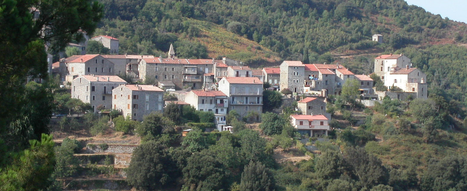 Village de Corse, France